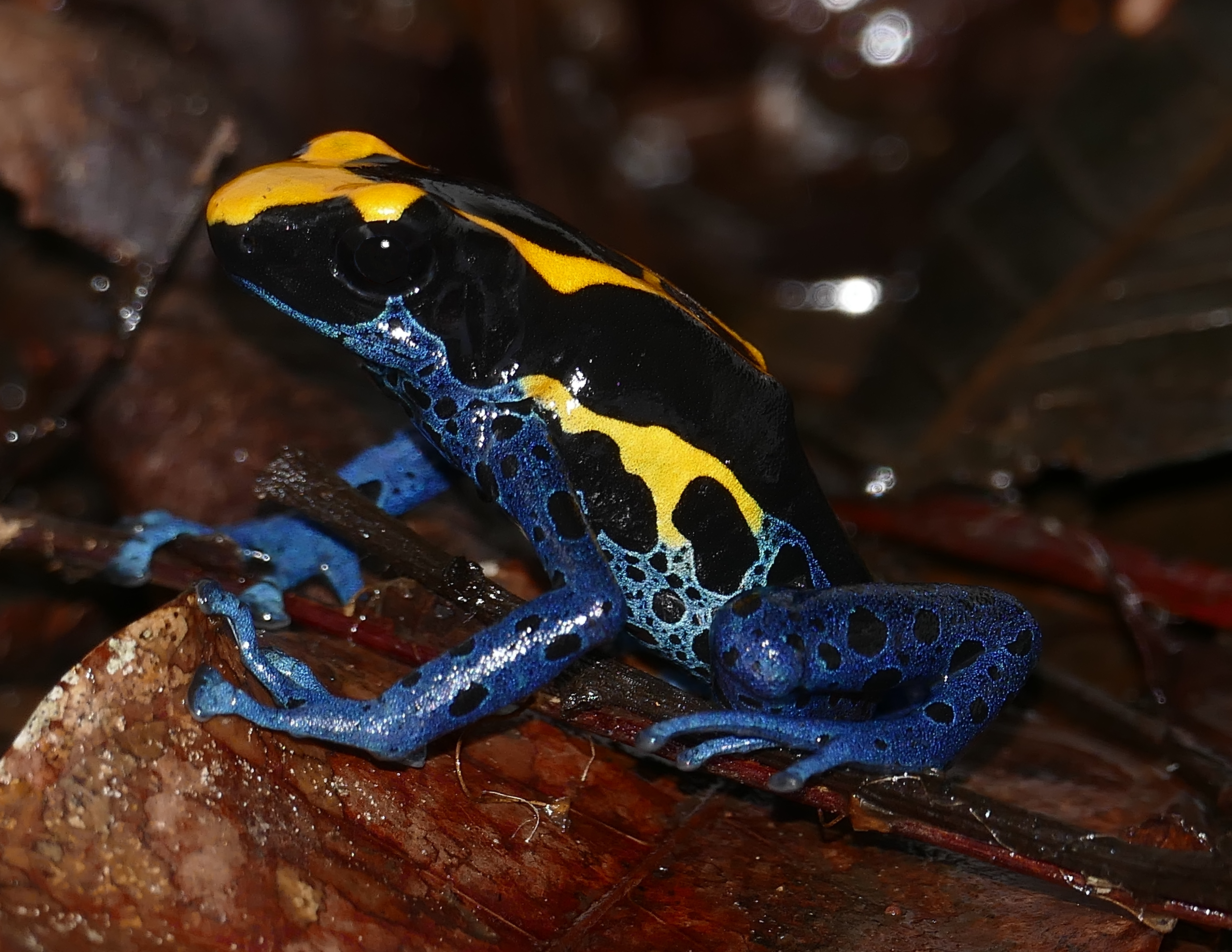 Piste de Bélizon, Roura, French Guyana, FRANCE